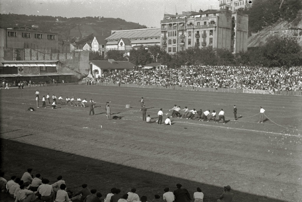 Título original: Competición de sokatira en el campo de fútbol de Atotxa (3/3) Localización: San Sebastián (Guipúzcoa)